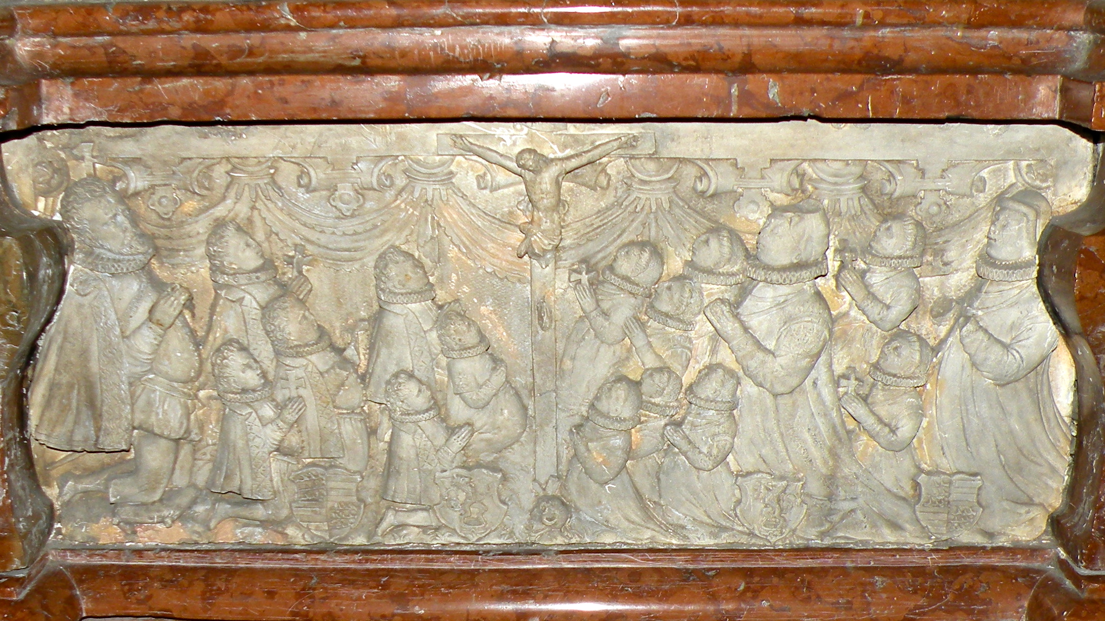 Epitaph des Lorenz Schütter in der Pfarrkirche Münzbach im Bezirk Perg in Oberösterreich. Der Auszug der Grabplatte zeigt die Familie Lorenz Schütters, Zu sehen ist er selber mit zwei Frauen, 6 Söhnen und 8 Töchtern, die teilweise bald gestorben sind.